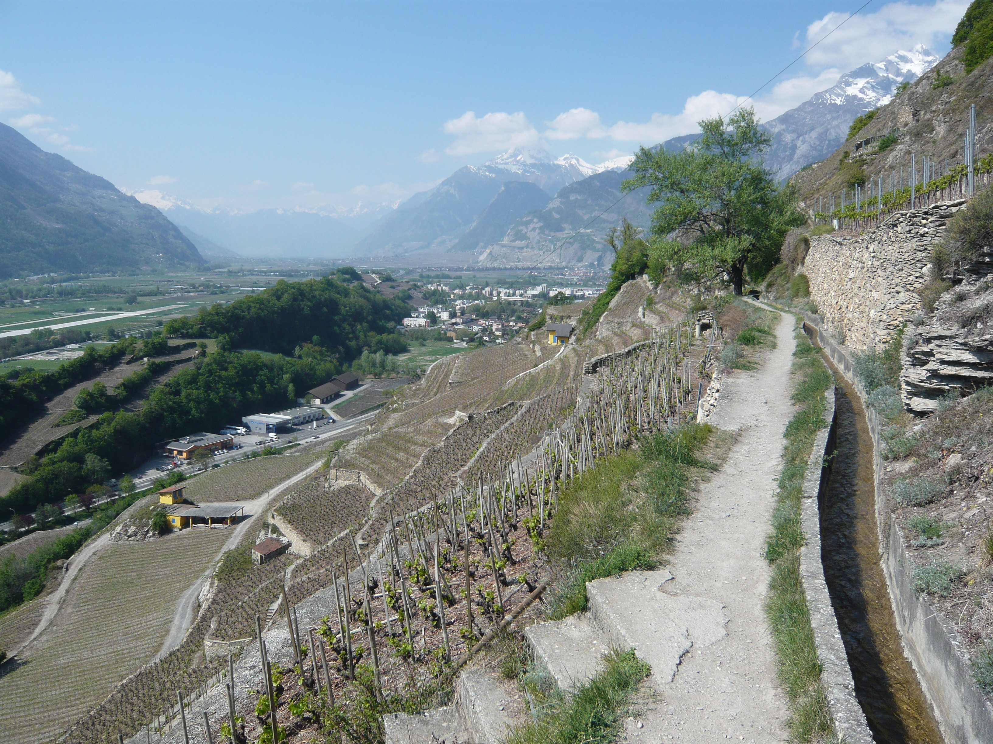 Bisse de Montorge avec vue en direction de l'ouest.